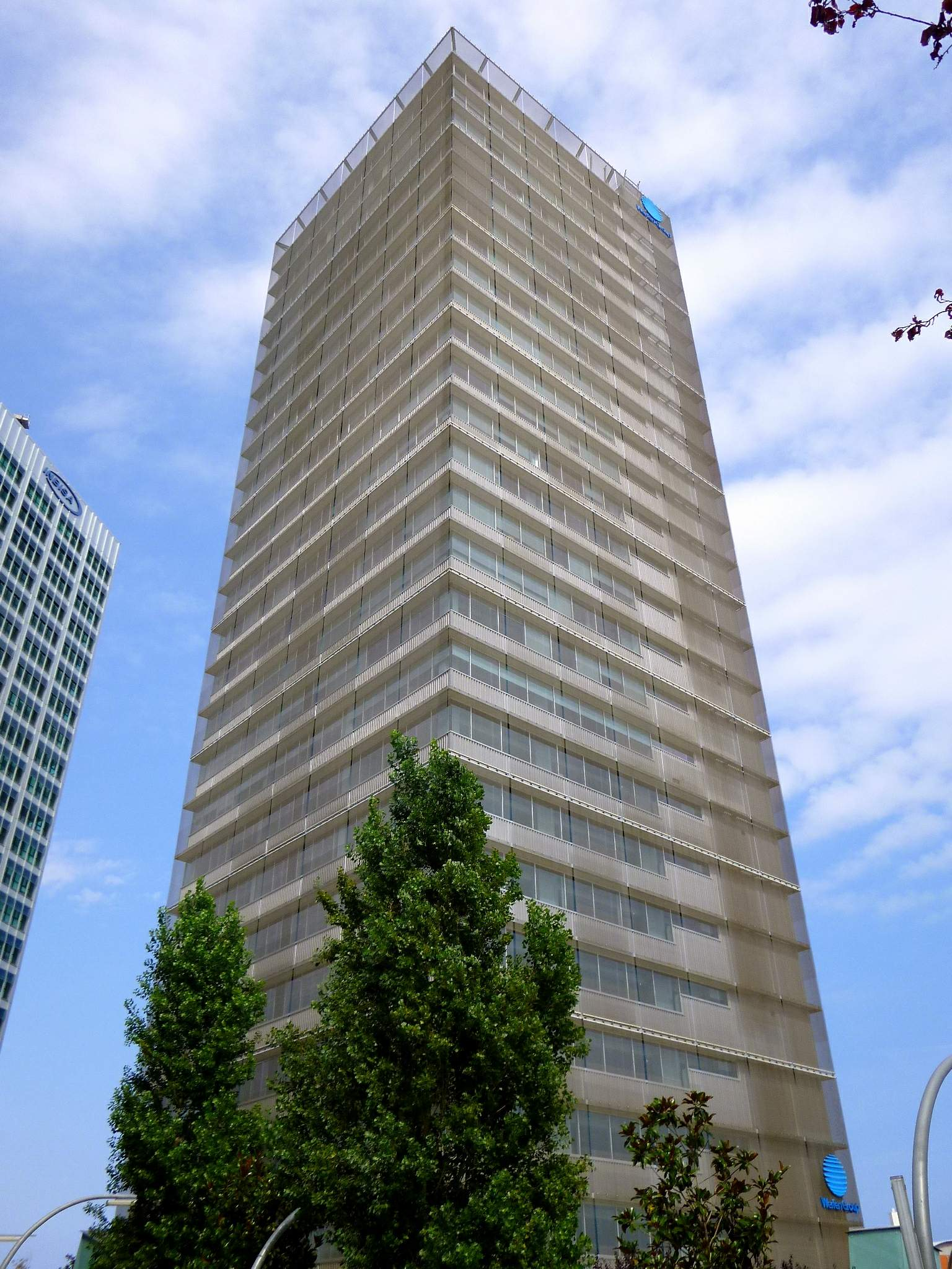 Torre Werfen (Hospitalet de Llobregat)